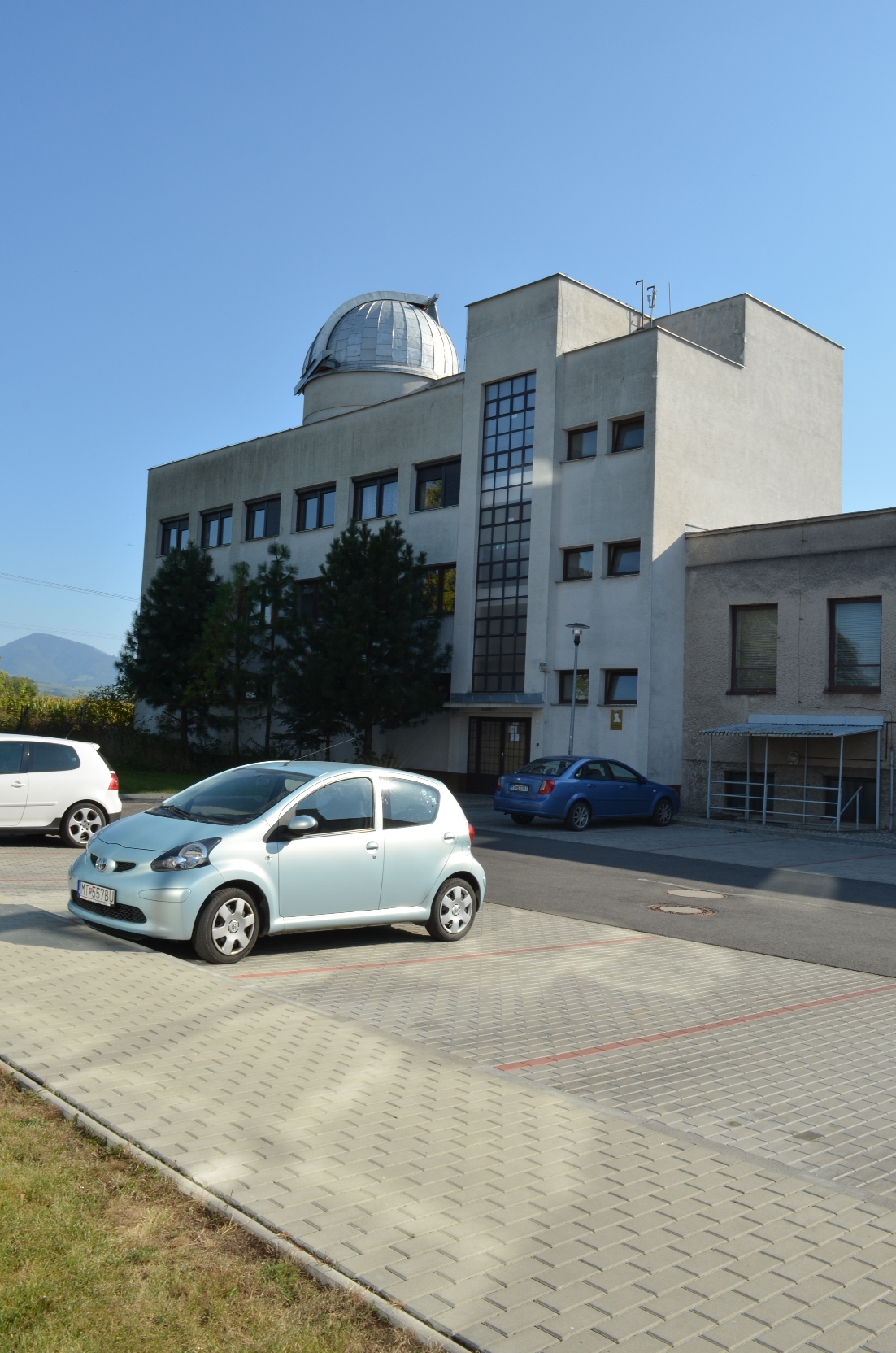 Astronomická pozorovateľňa